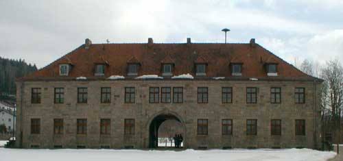 Kommandantur am Eingang zur KZ Gedenkstätte Flossenbürg Das Bild wurde von Martin Heiß am 8. März 2004 aufgenommen.